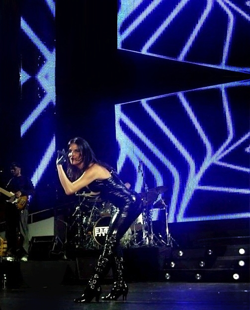 Foto de meu arquivo pessoal de shows de Ivete Sangalo. Ivete em 2006 em Natal.